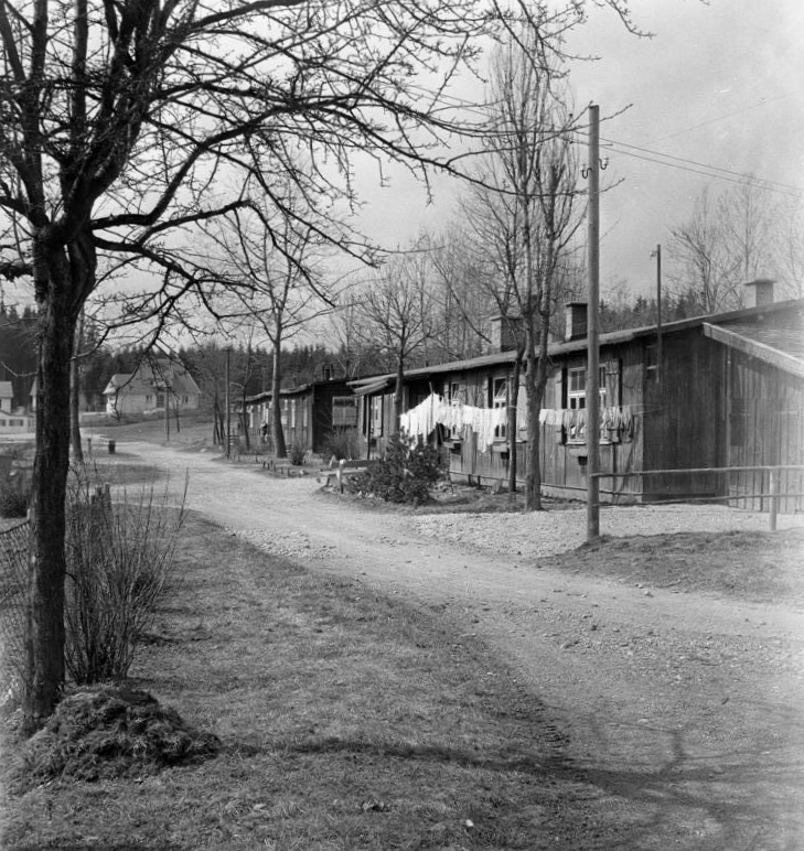 Neu-Gablonz bei Kaufbeuren/Schwaben Gesprengte Bunker, Hallen, letzte Baracken der früheren Munitionsfabrik, auf deren Gelände"Neu-Gablonz" entstand.